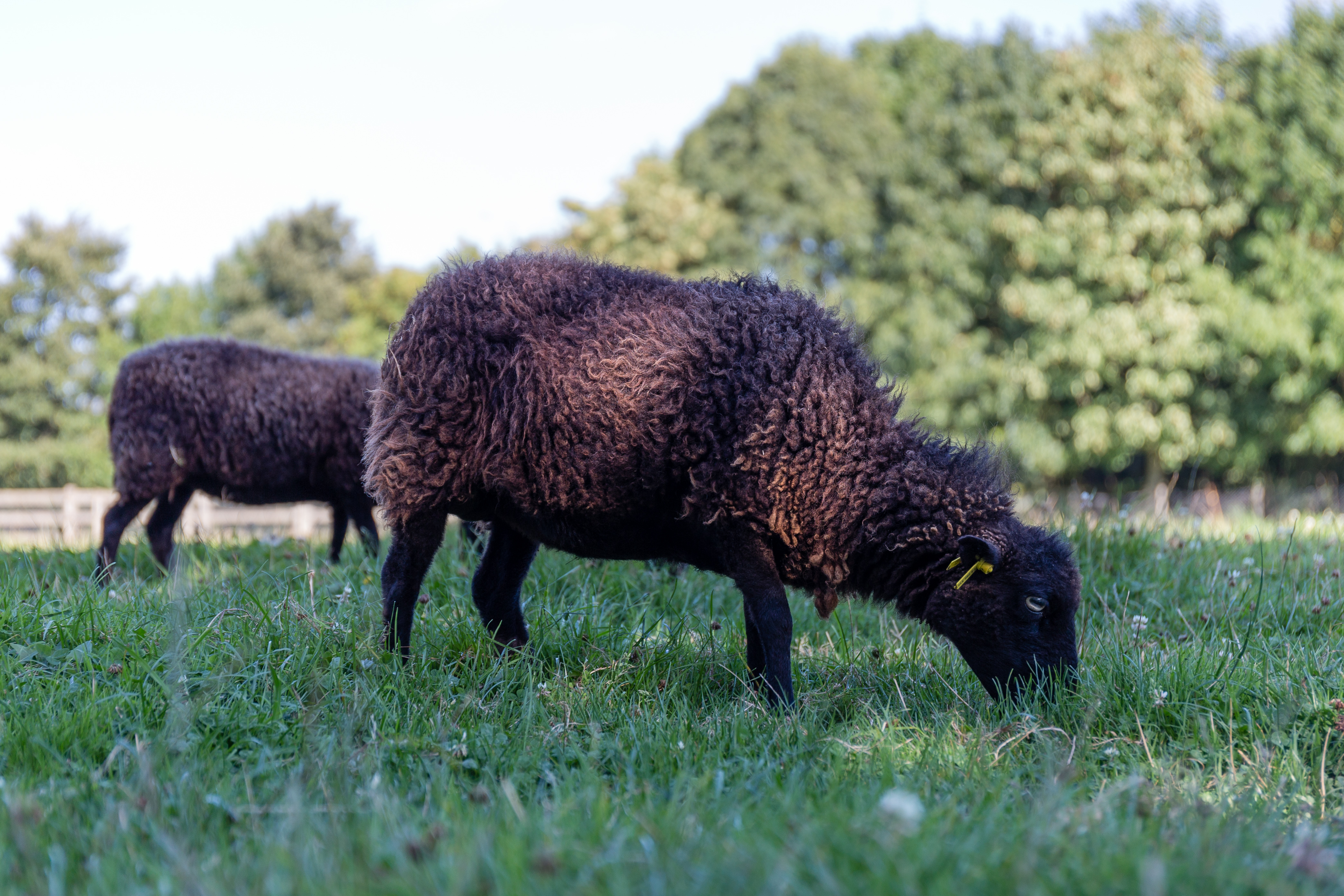 Mouton d'Ouessant à l'Écomusée du pays de Rennes.